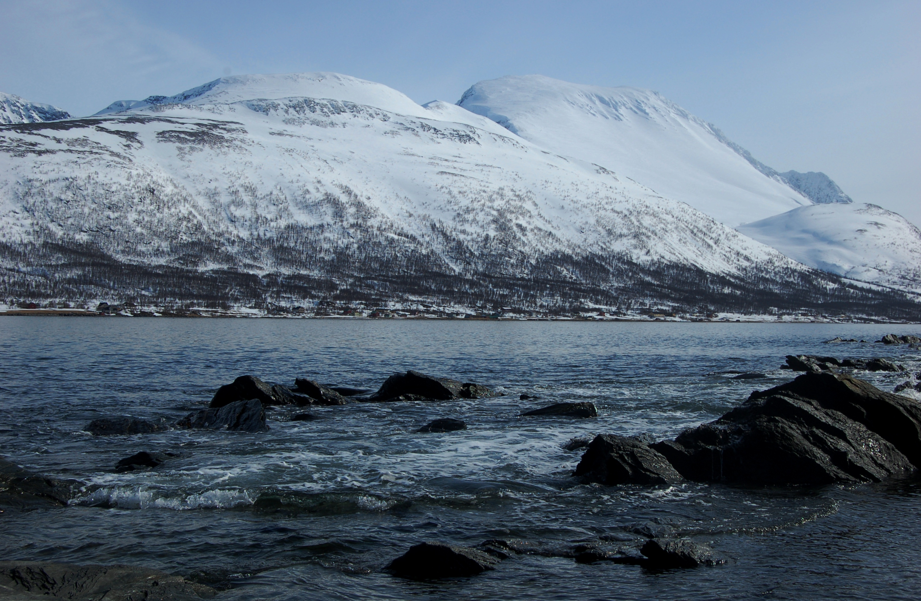 Storgalten sett fra Mo, Nord-Lenangen